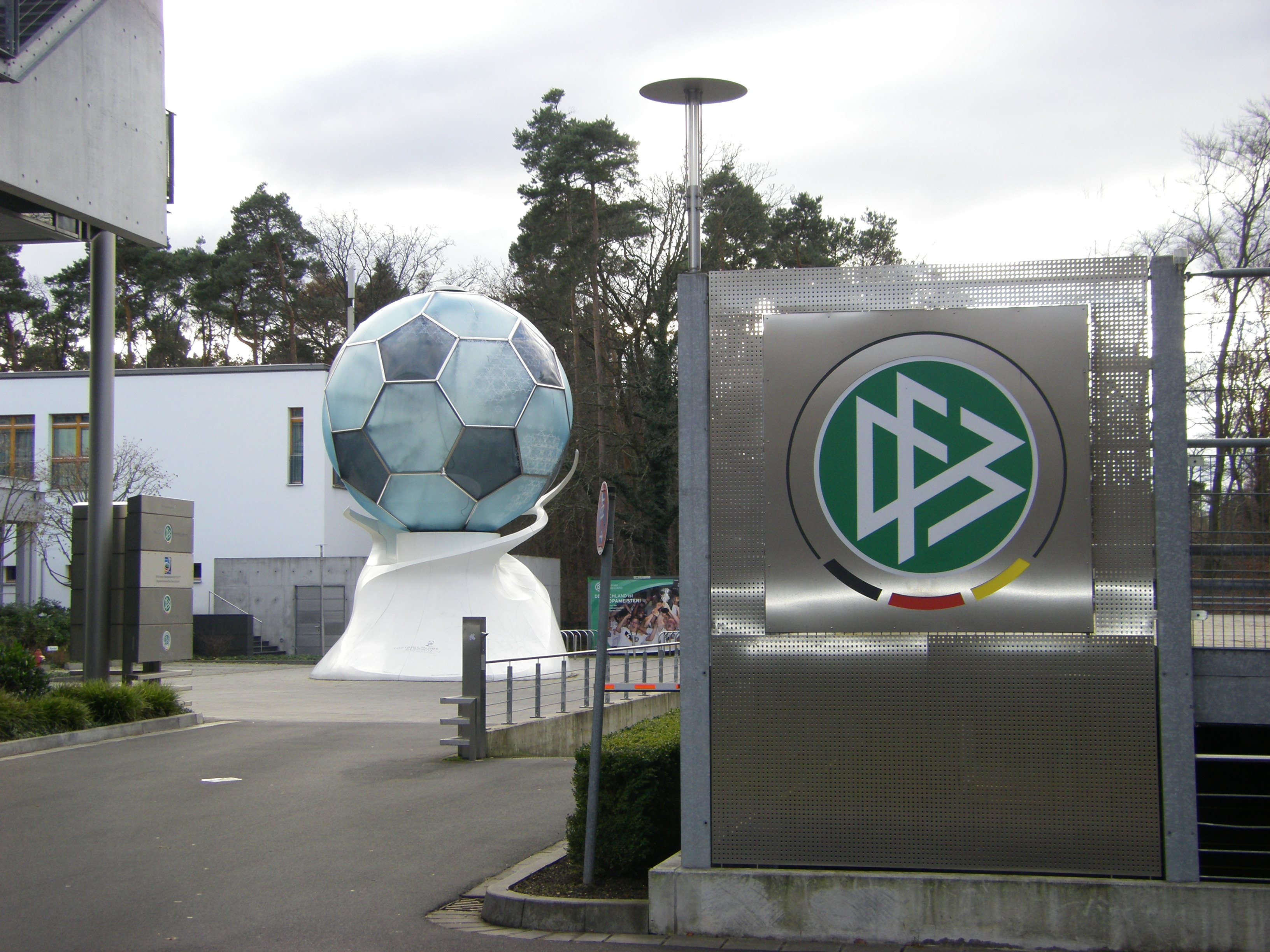 Zentrale des DFB in Frankfurt am Main